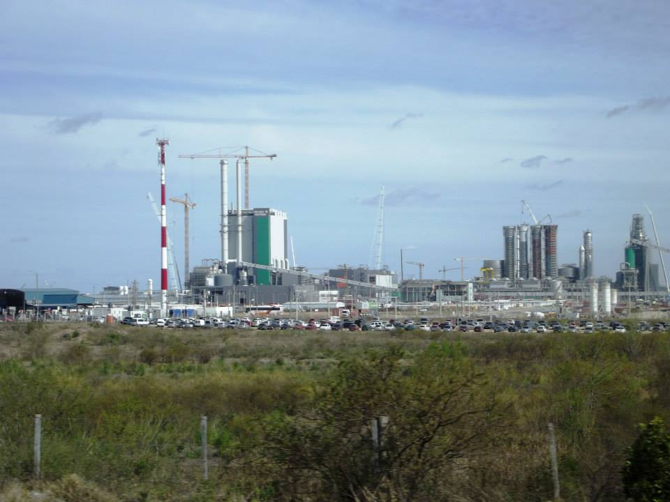 Vista de la Planta Industrial de Montes del Plata, actualmente el emprendimiento forestal más importante del país.